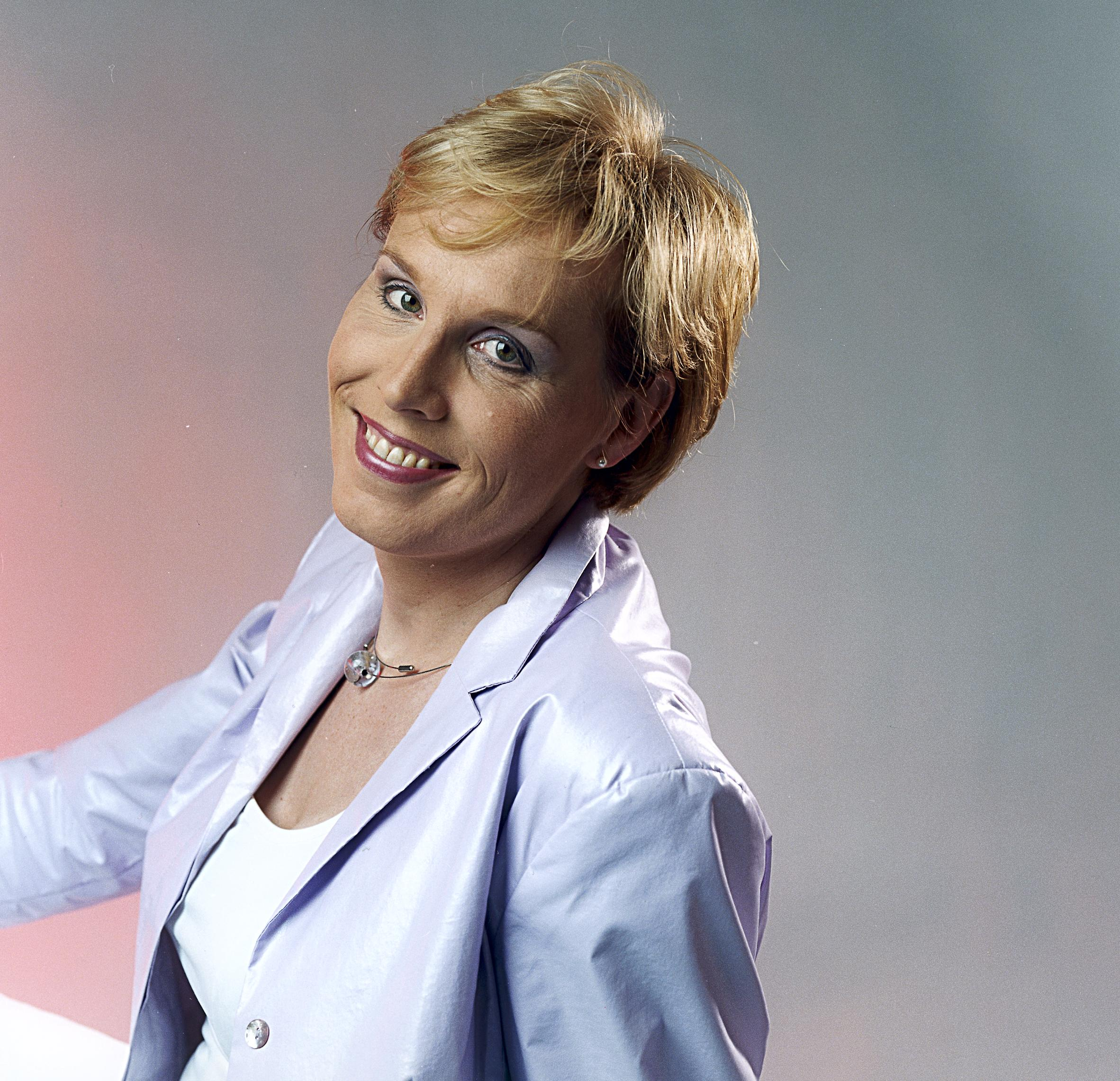 Barbara M. Veenman